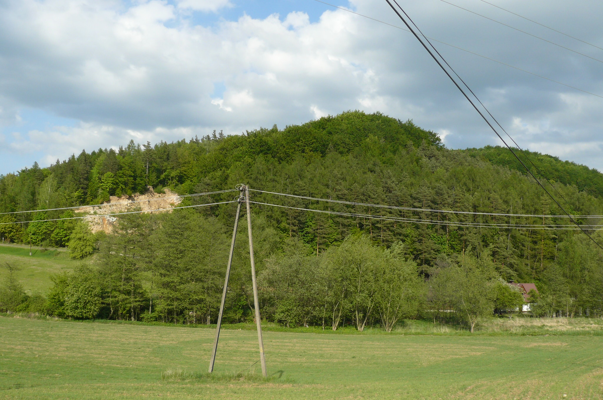 Słupiec w Krowiarkach od zach.